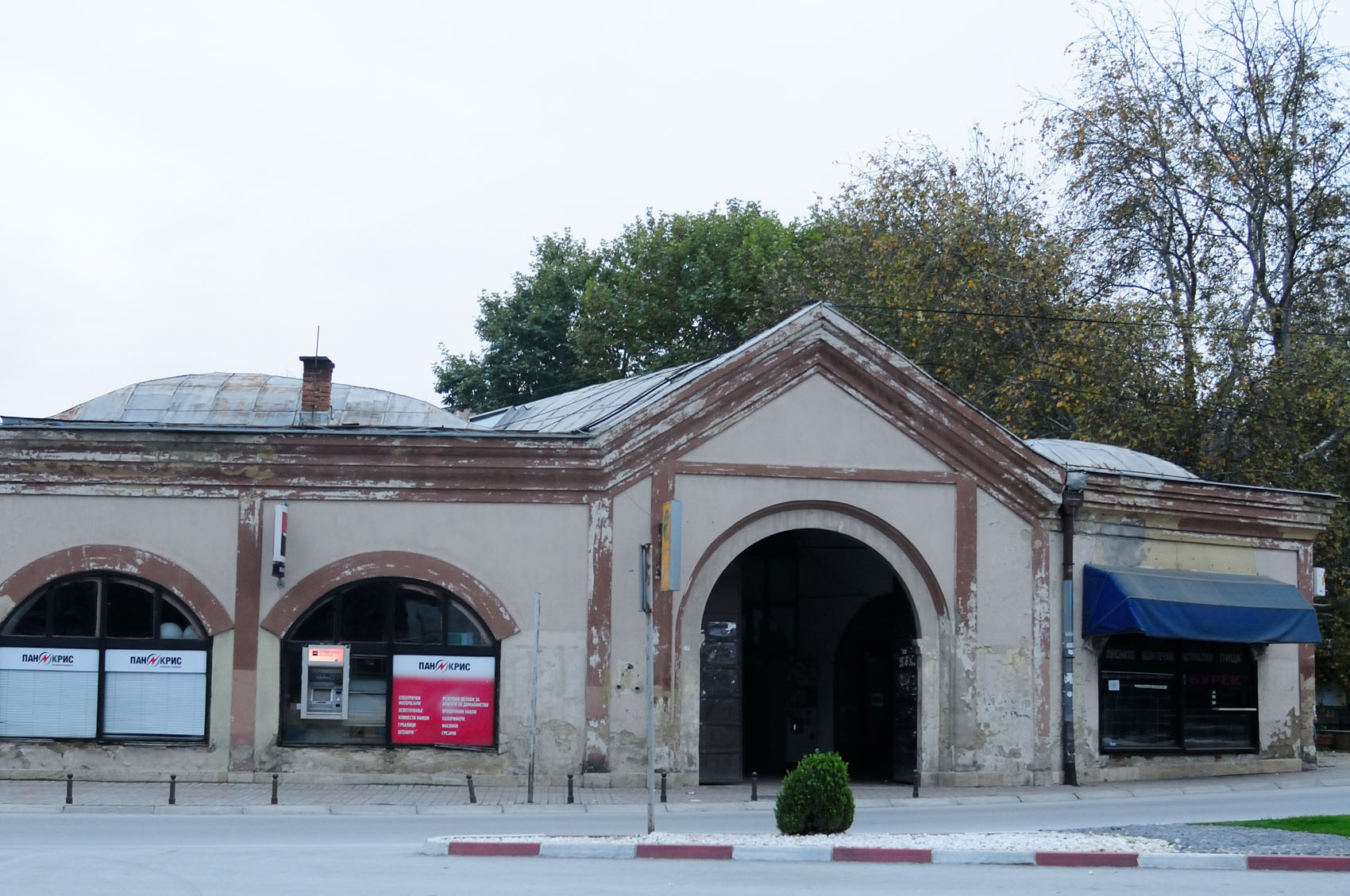 Безистен Битола, Р.Македонија